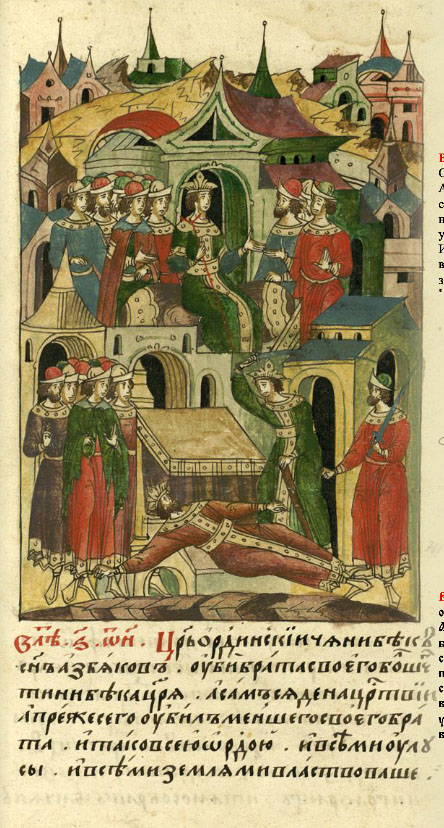 ЛИЦЕВОЙ ЛЕТОПИСНЫЙ СВОД В 6848 год царь Ордынский Джанибек, сын Азбяка, убил брата своего старшего Тинибека, а сам сел на царство. А еще раньше он убил своего младшего брата. И стал владеть всей Ордой, всеми улусами и всеми землями.